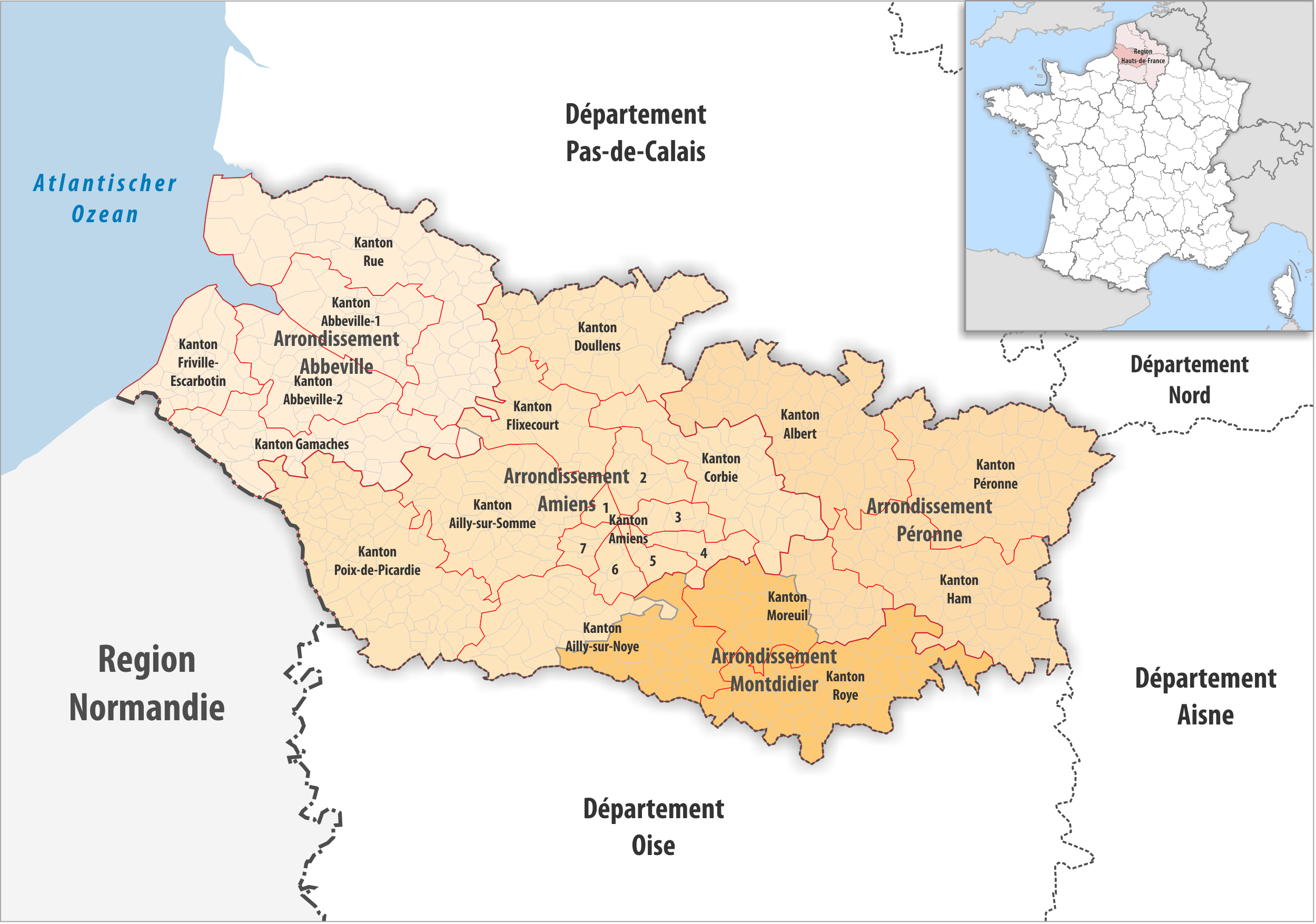 Gemeinden, Kantone und Arrondissemente im Departement Somme